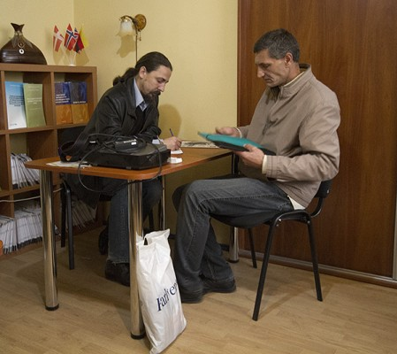 Надання громадянам безоплатної правової допомоги Мукачево